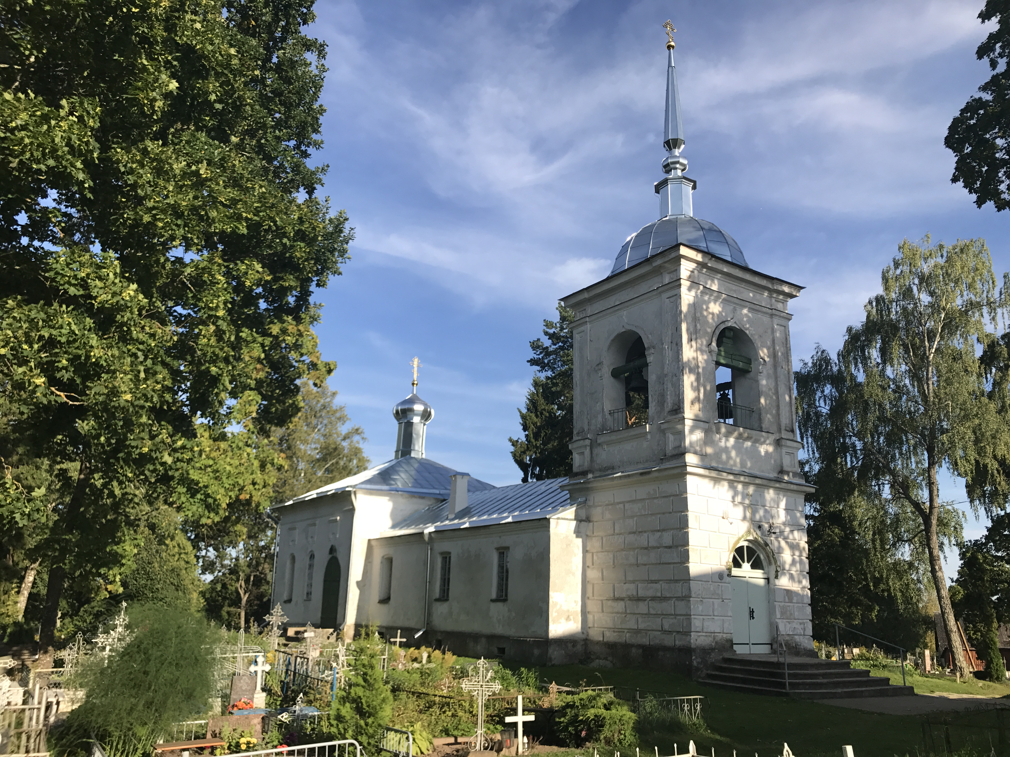 Saatse Püha Paraskeva kirik 2017